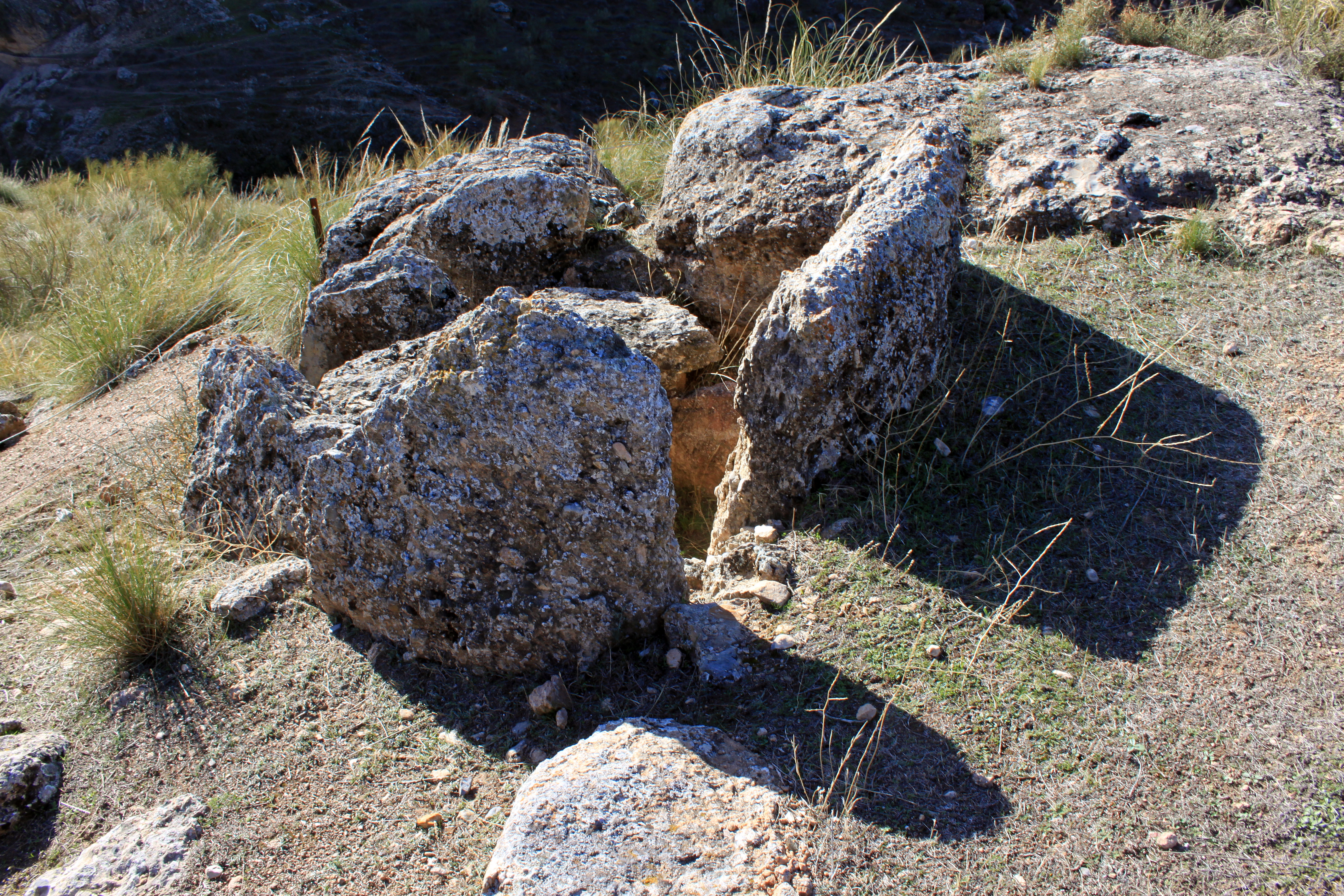 Dolmen 141 del Parque Megalítico de Gorafe situado en la Hoya del Conquil. Gorafe, provincia de Granada, Andalucía, España.